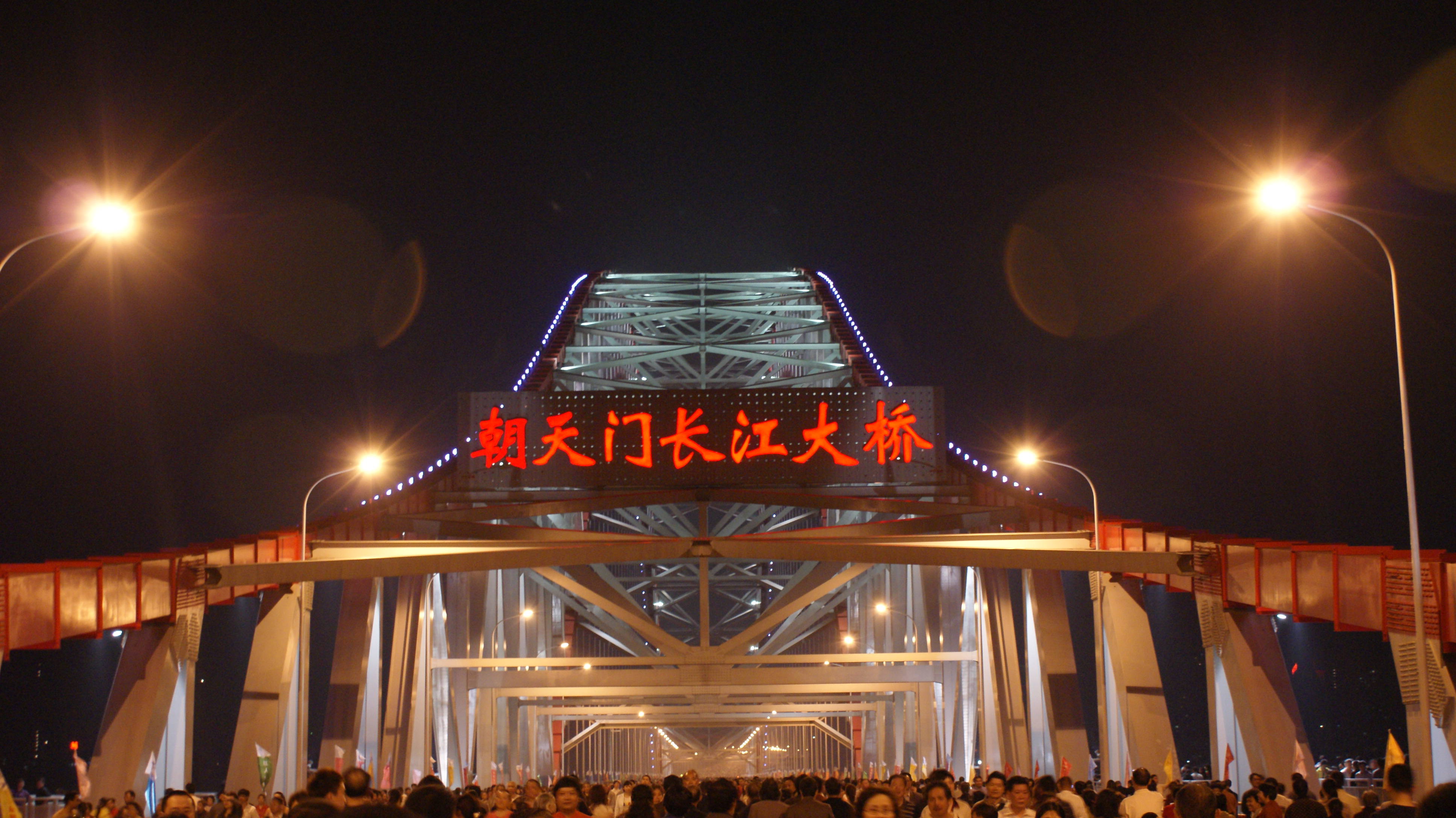 重庆朝天门长江大桥